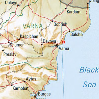 Slatni Pjasazi - Lage des Ortes in Bulgarien